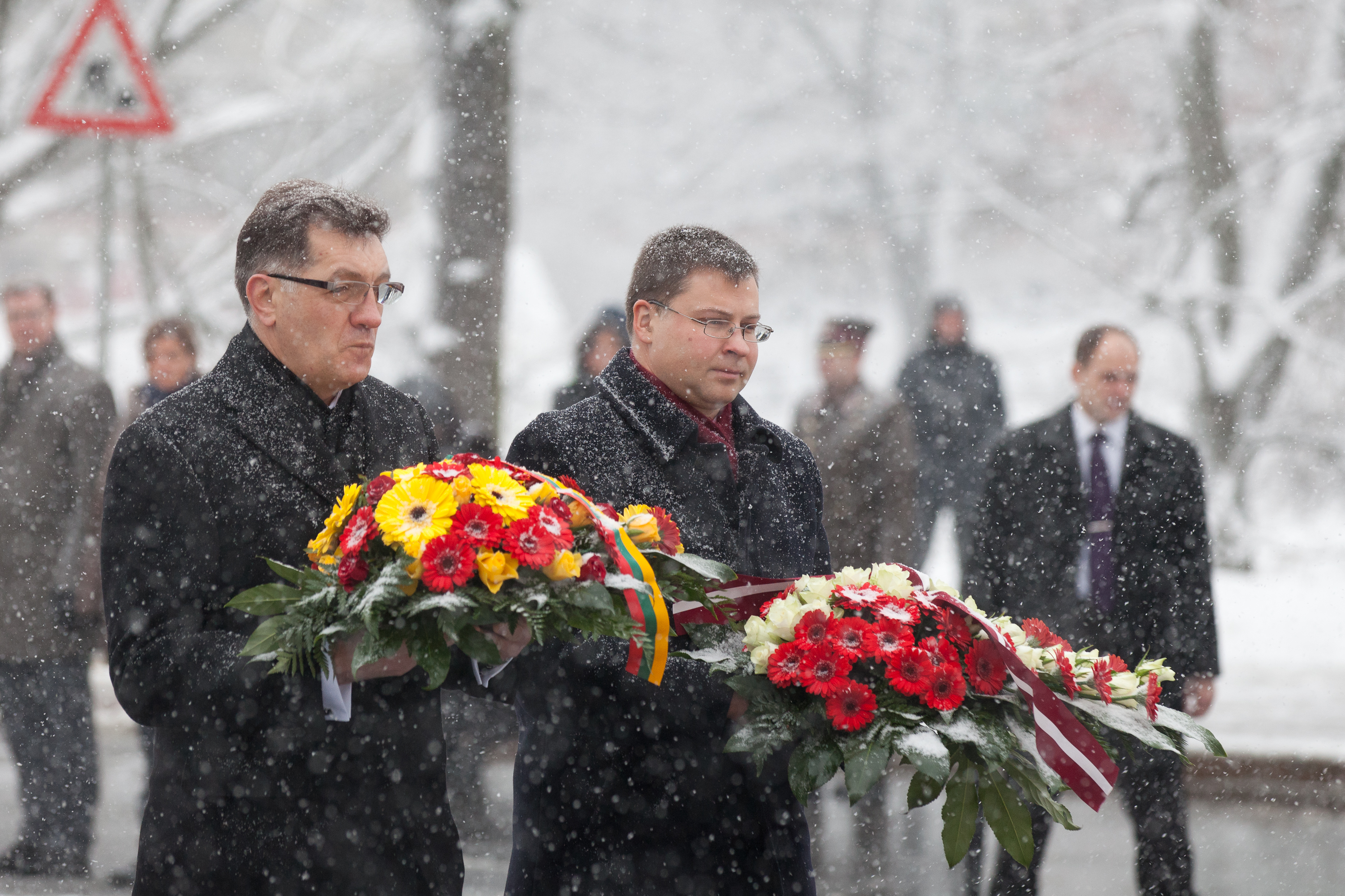 Foto: Toms Norde, Valsts kanceleja